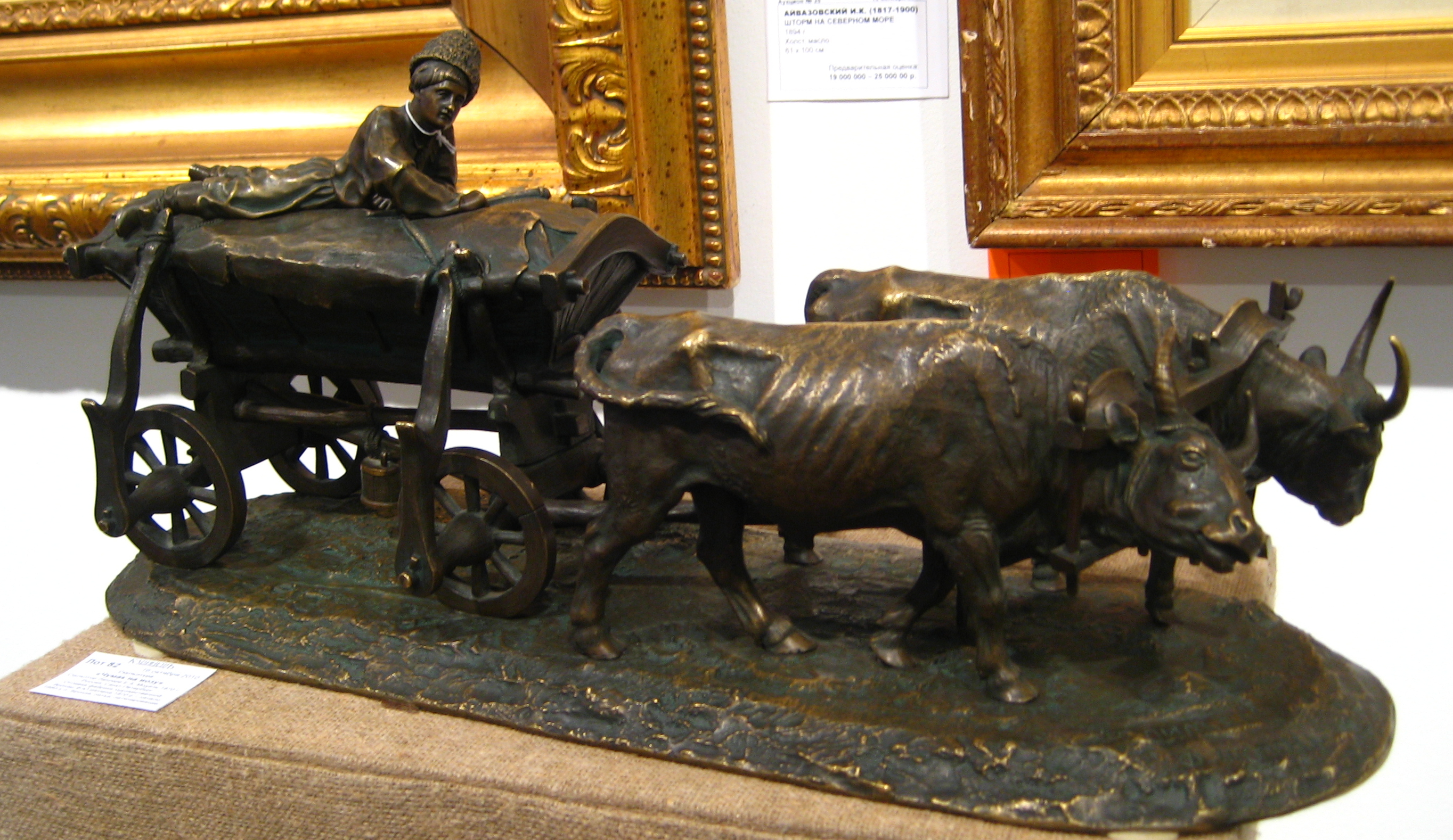 Скульптура "Чумак на возу". Лансере Е.А. Модель 1870 года. Россия, СПб. Отливка фабрики художественной бронзы Ф.Ю. Шопена, 1870-начало 1880-х годов. Бронза, литье, патинирование